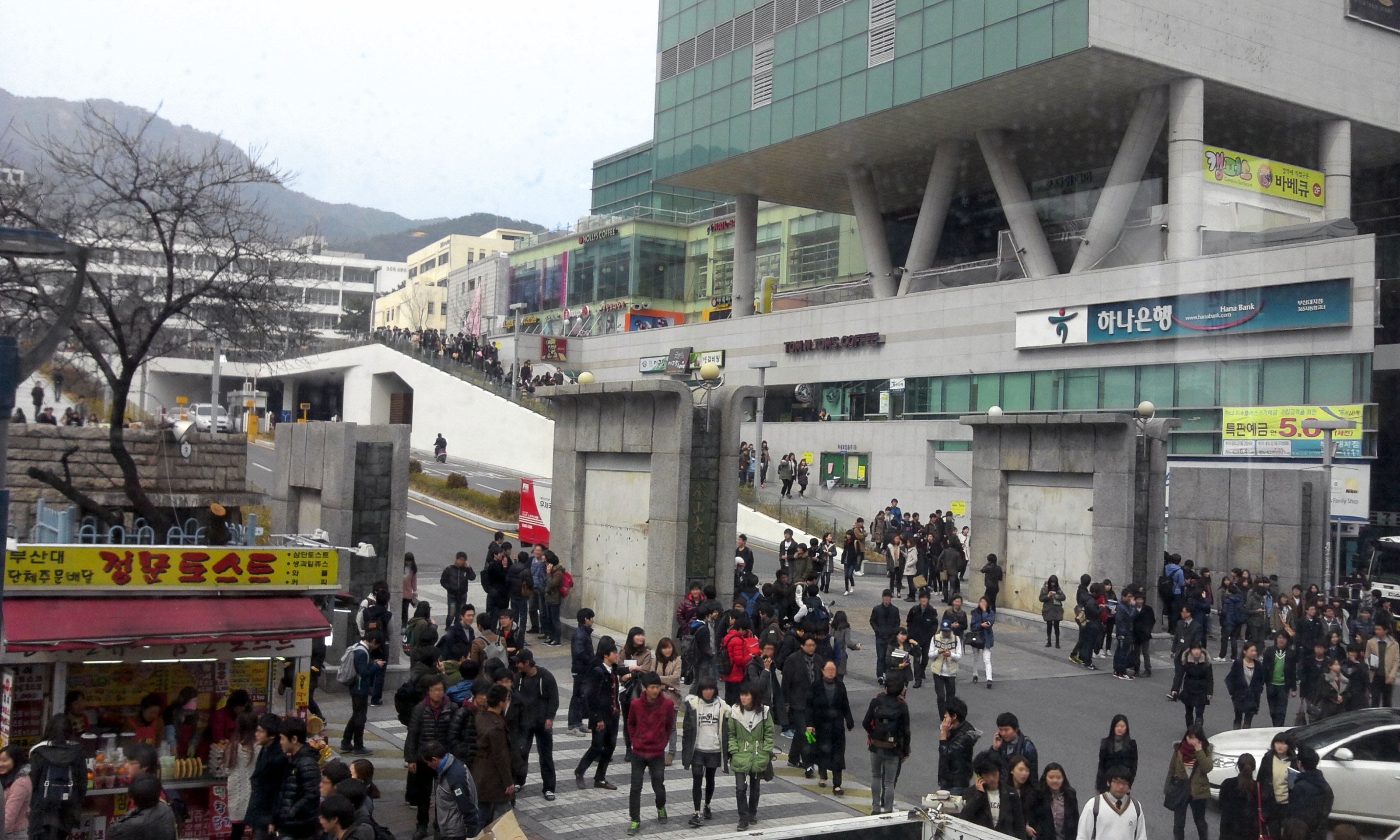 부산대학교 장전캠퍼스 정문